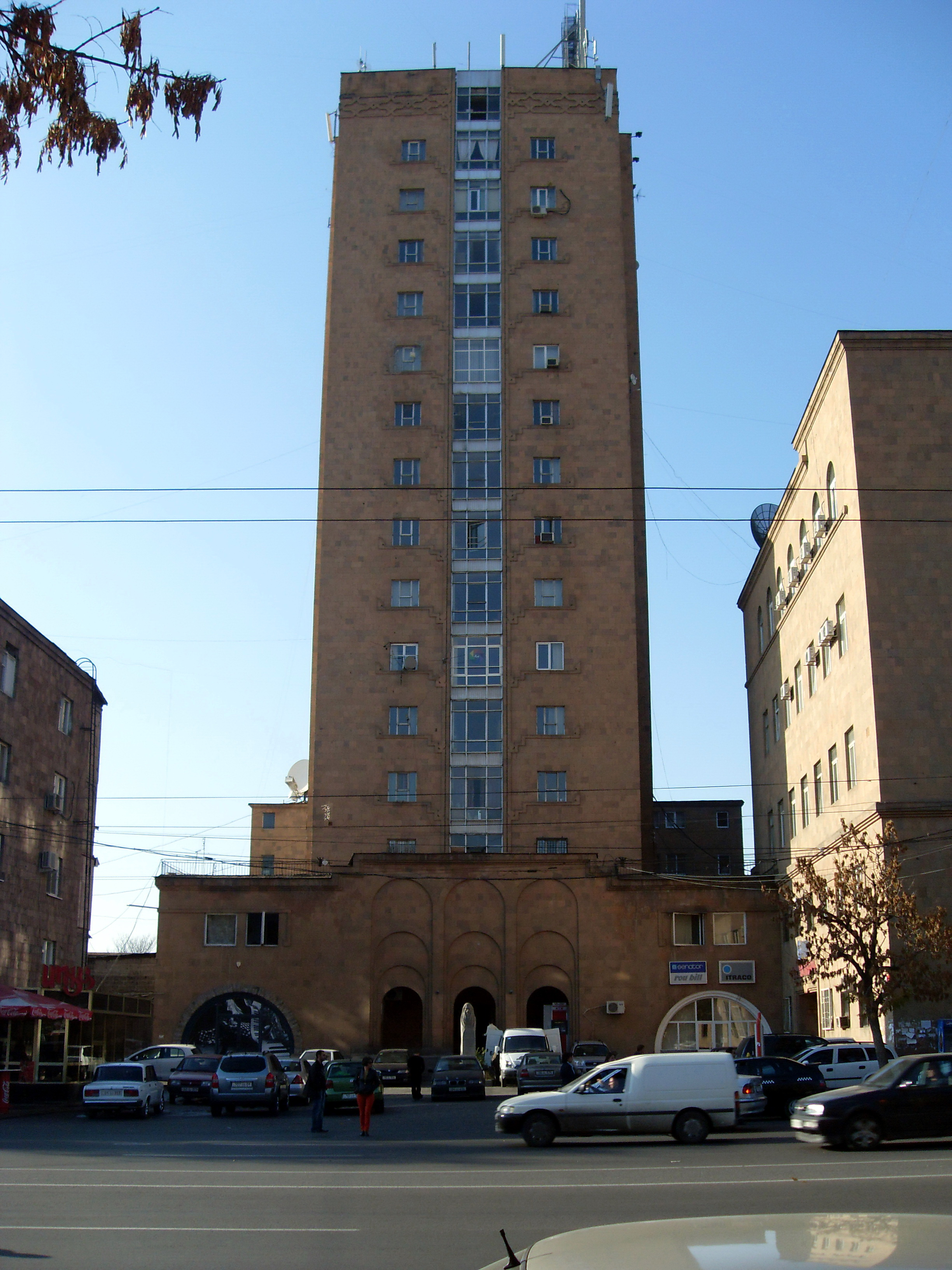 Մամուլի շենք, Երևան